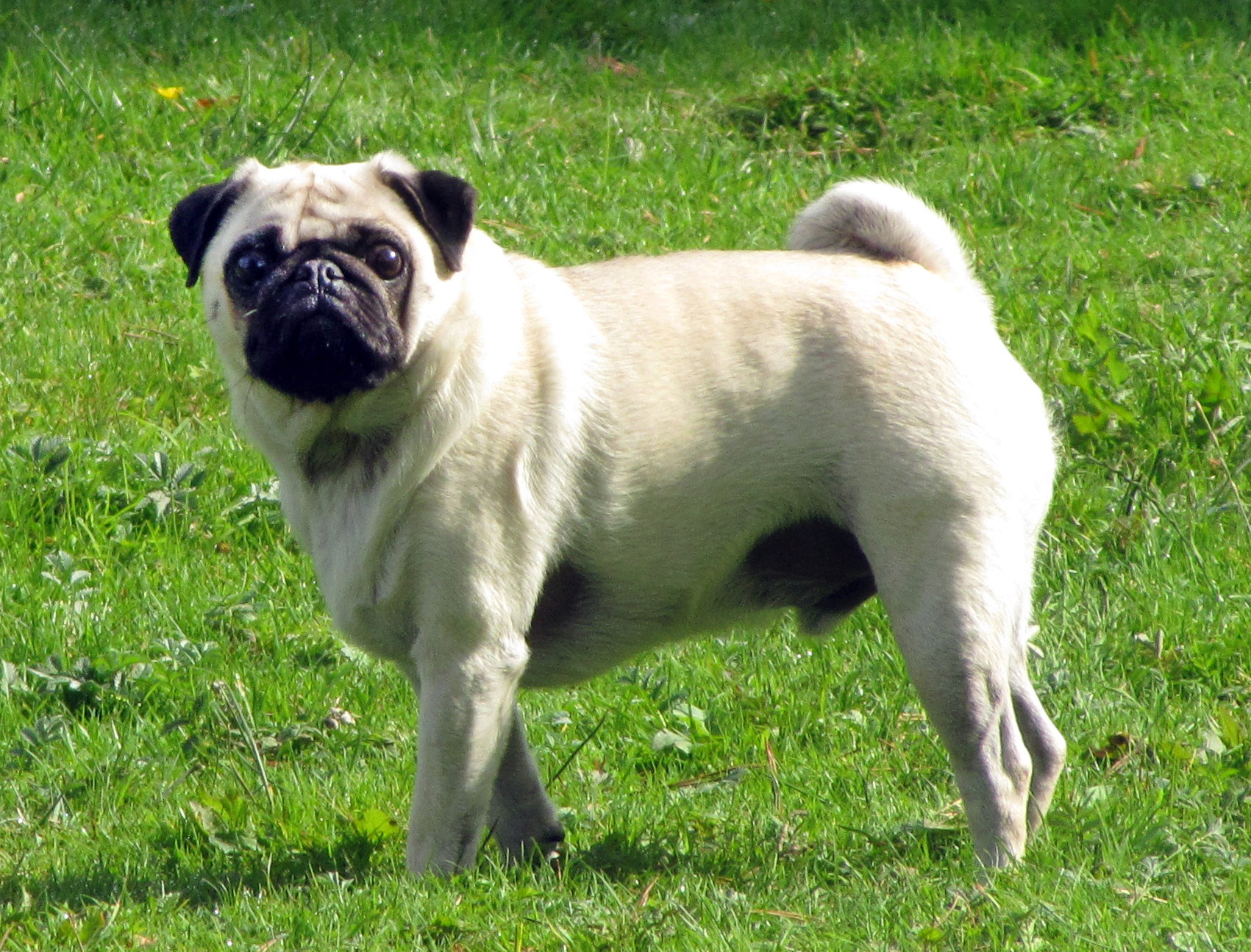 2,5 yaşında kremrengi erkek pag